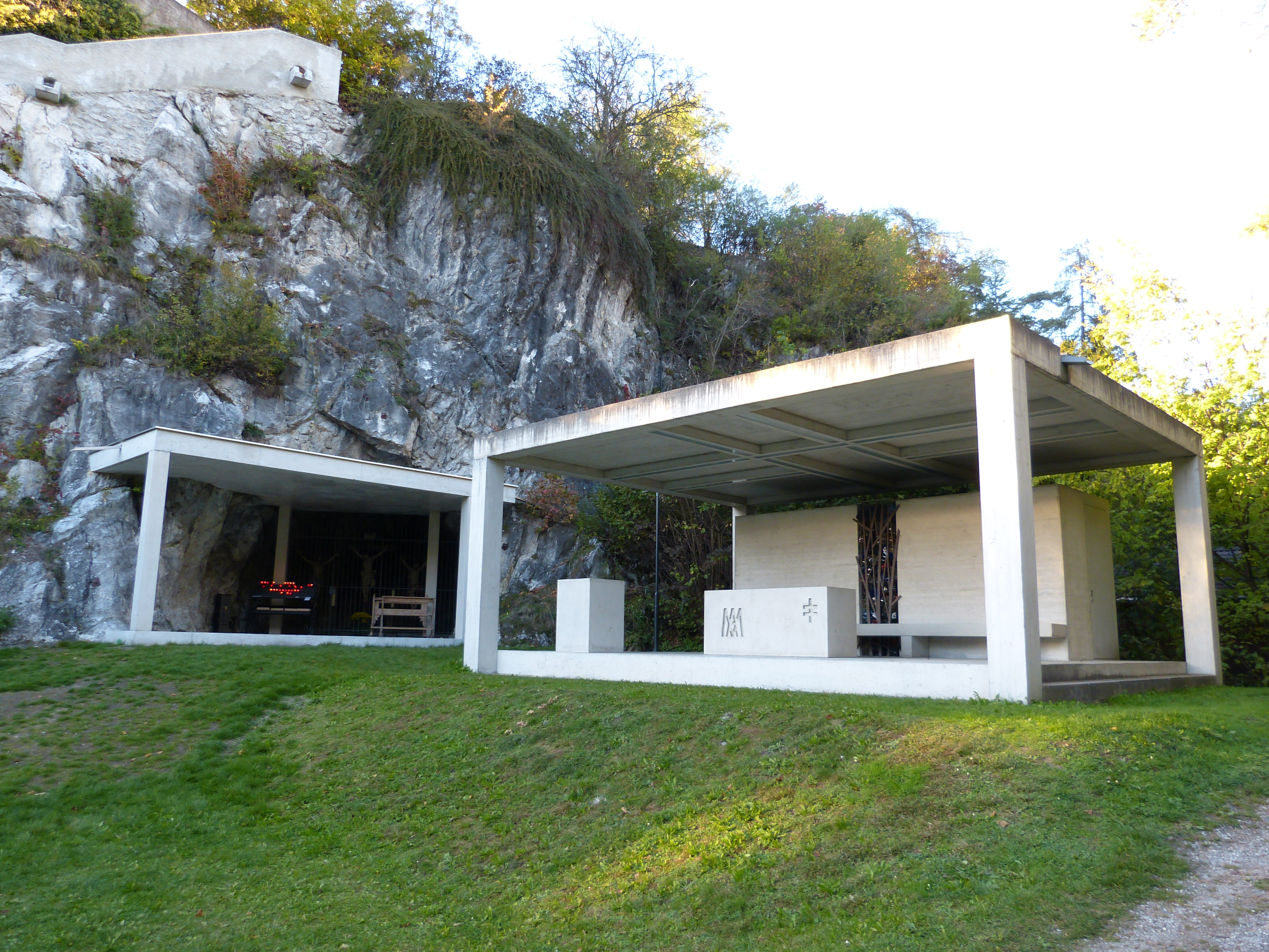 Den Ruf als Wallfahrtskirche begründen Wunderheilungen im 18. und 19. Jahrhundert in einem grottenartigen Stolleneingang. Davor die Nachtwallfahrtskapelle Locherboden aus dem Jahr 1996, Gerold Wiederin, Entwurf Helmut Federle. This media shows the remarkable cultural object in the Austrian state of Tyrol listed by the Tyrolean Art Cadastre with the ID 19835. (on tirisMaps, pdf, more images on Commons)